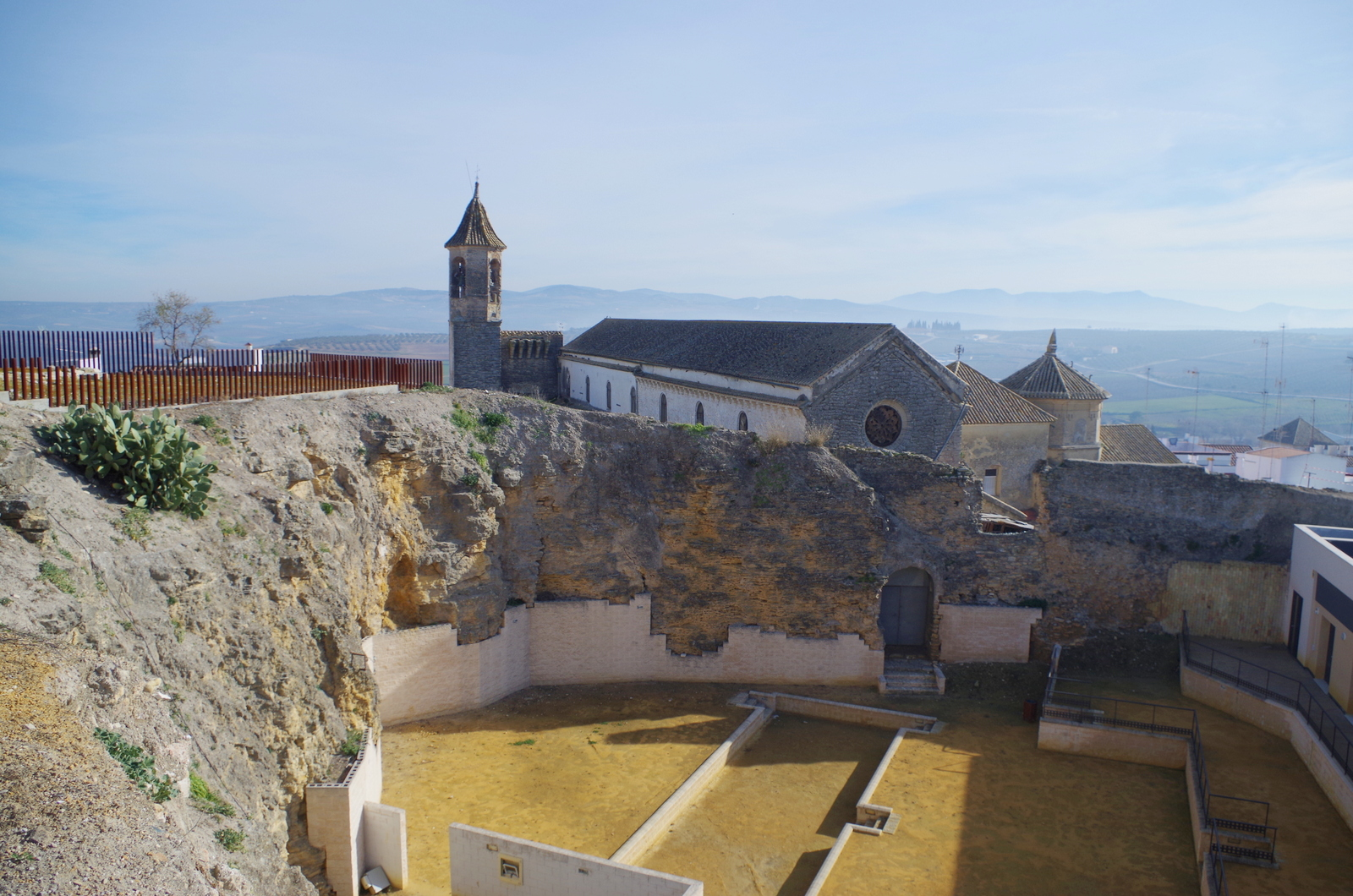 Aguilar de la Frontera (provincia de Córdoba, España).